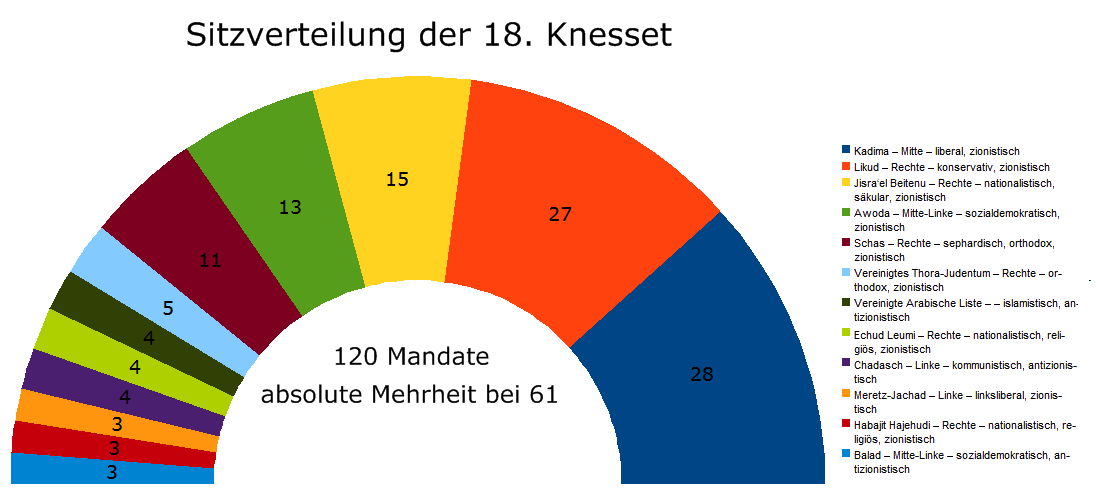 Die Sitzverteilung der 18. Knesset und eine kurze Charakterisierung der eingezogenen Parteien und Listenverbindungen.